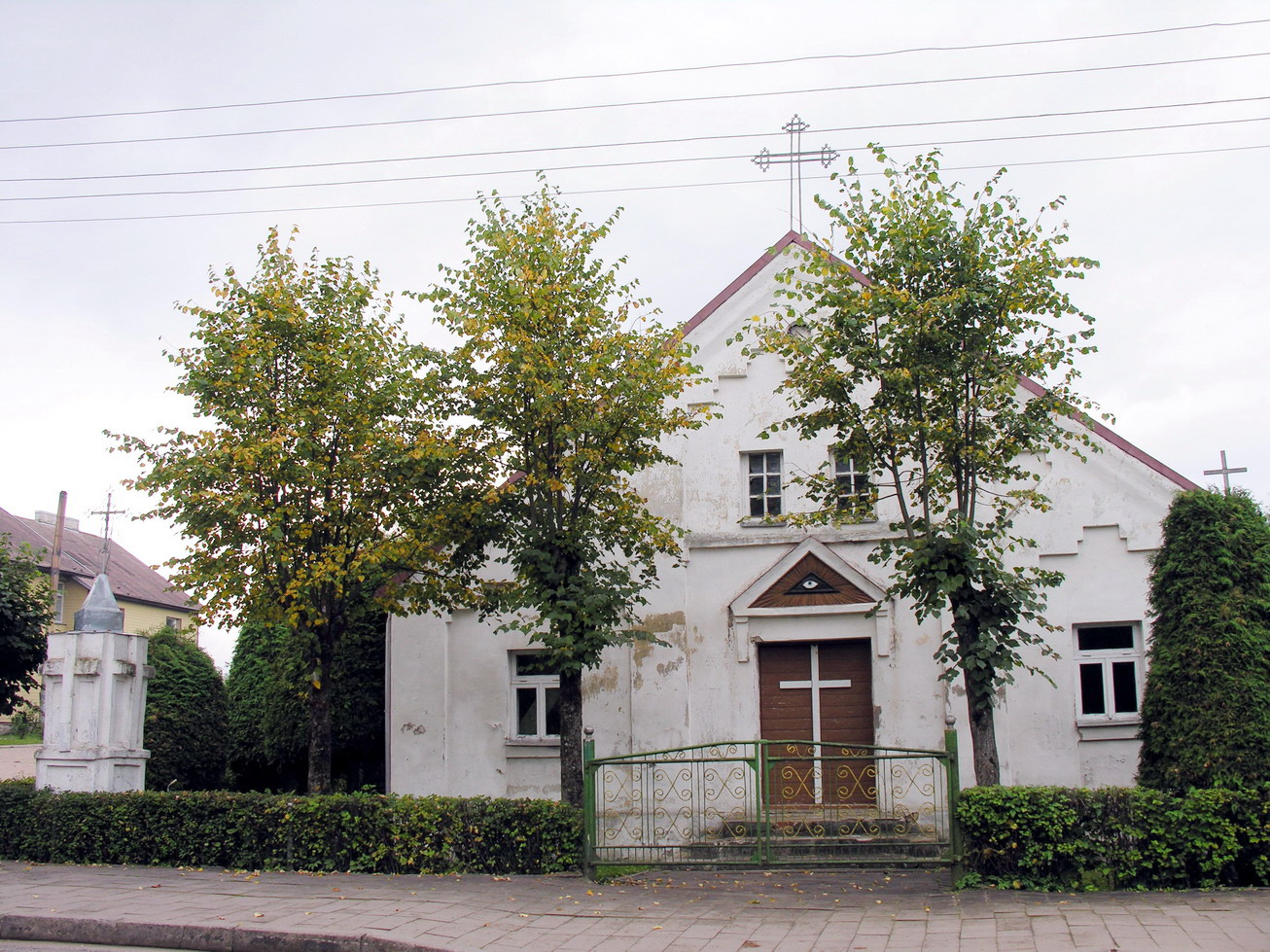 Laižuvos Švč. Trejybės bažnyčia 2006 m. rugsėjo 28 d.